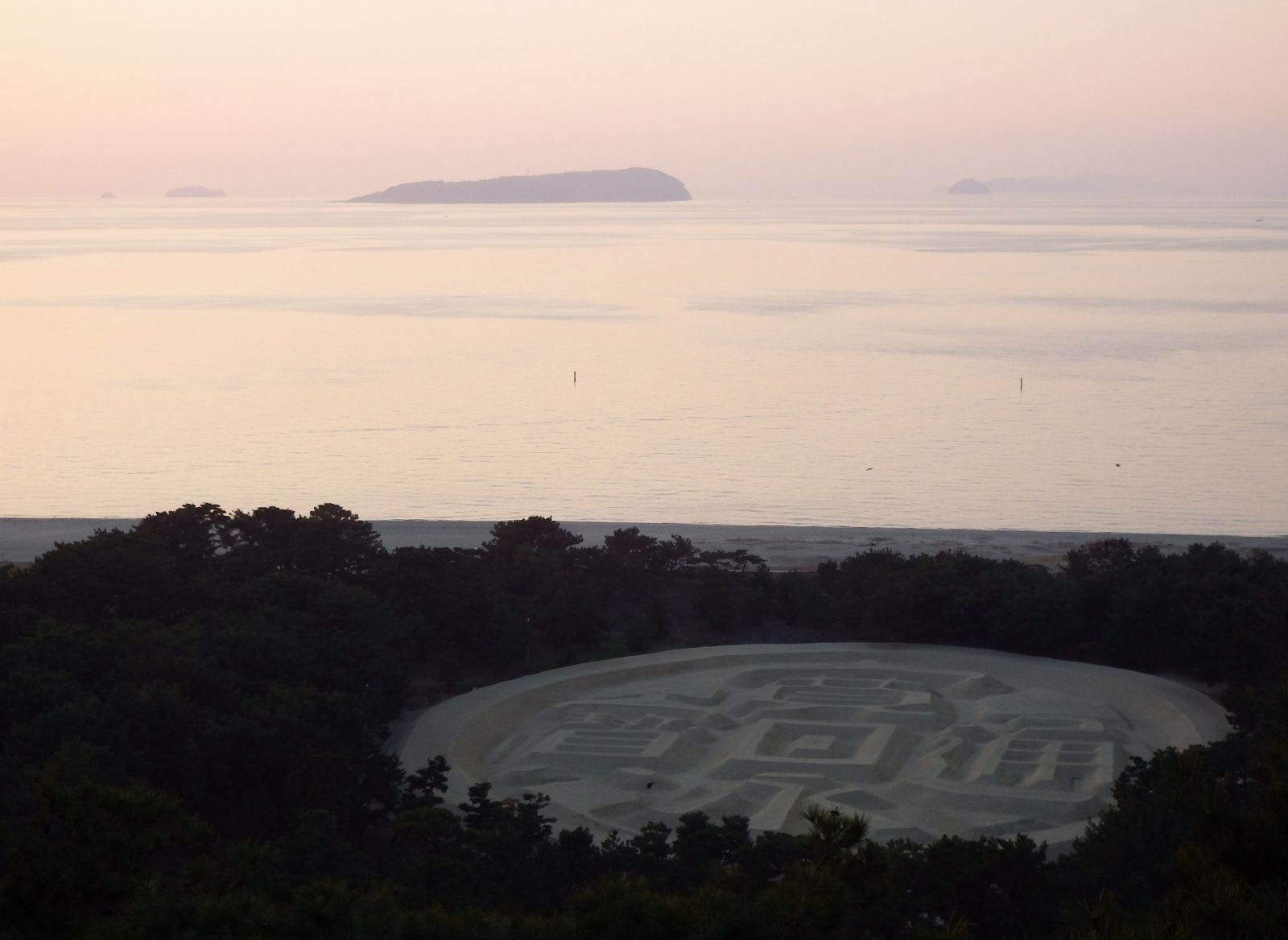 夕暮れの銭形